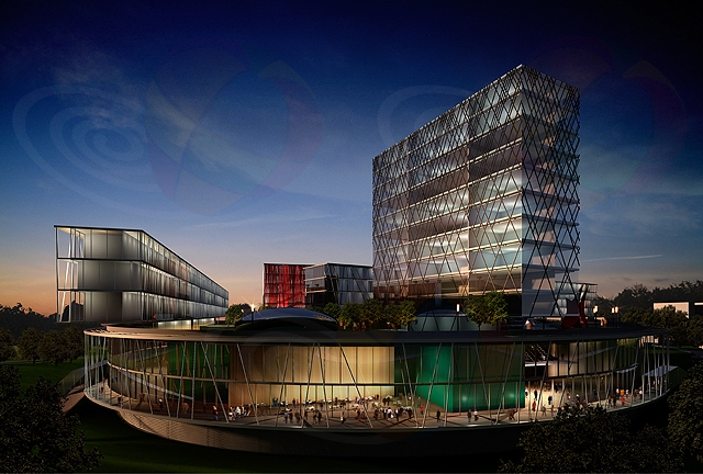 Проект кампуса школы СКОЛКОВО